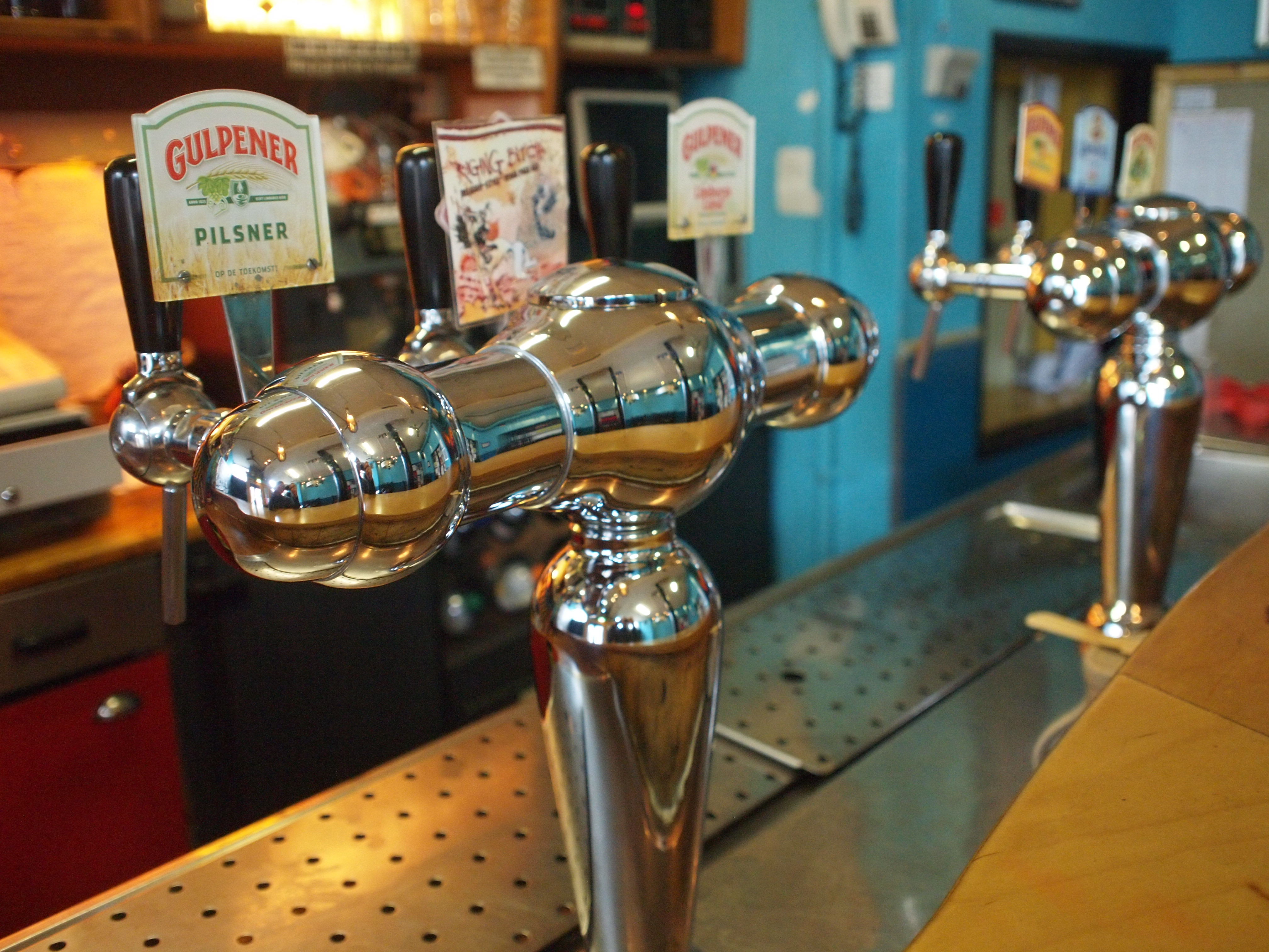 Biertap. Taken at ACU, Utrecht, Netherlands.